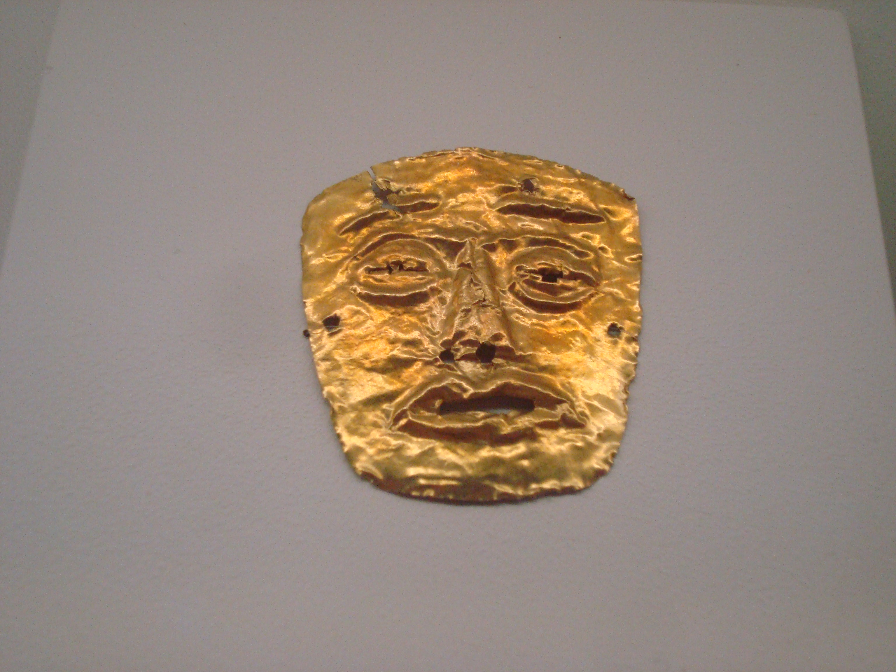 Oro precolombino. Máscara. Costa Rica